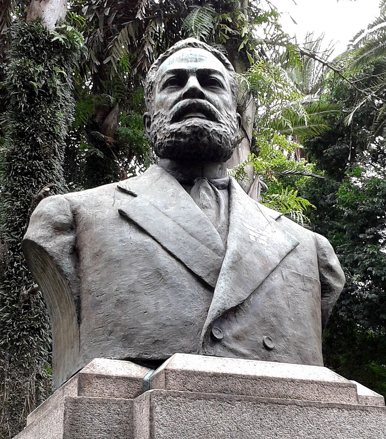 Yolando Mallozzi - Busto de Luís Gama. Largo do Arouche, no centro de São Paulo, SP, Brasil.